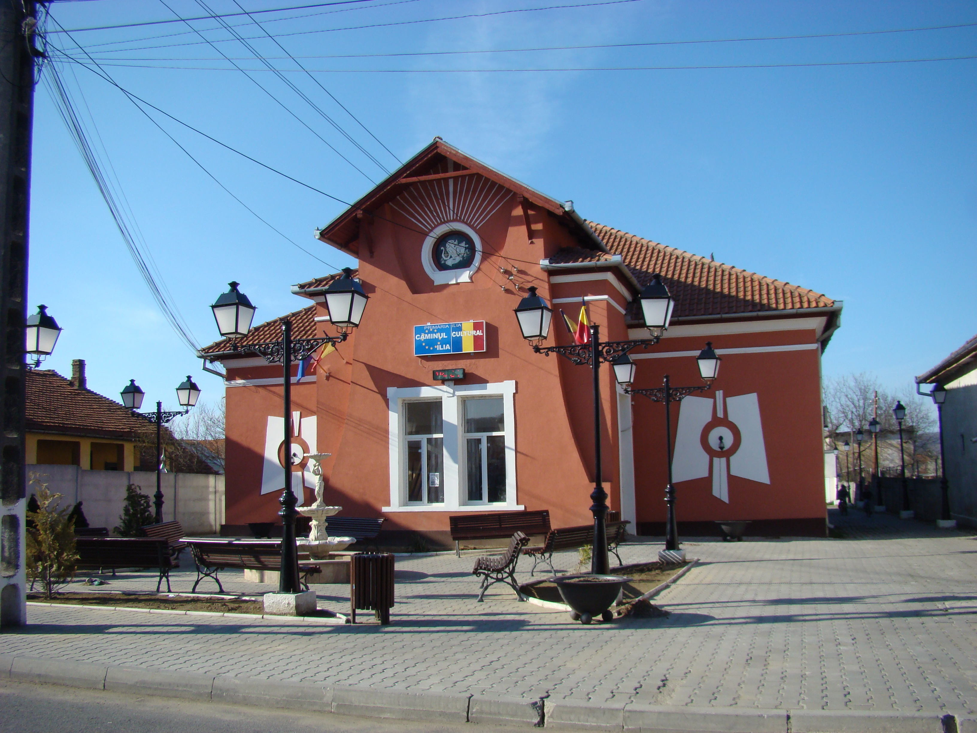 Ilia, județul Hunedoara